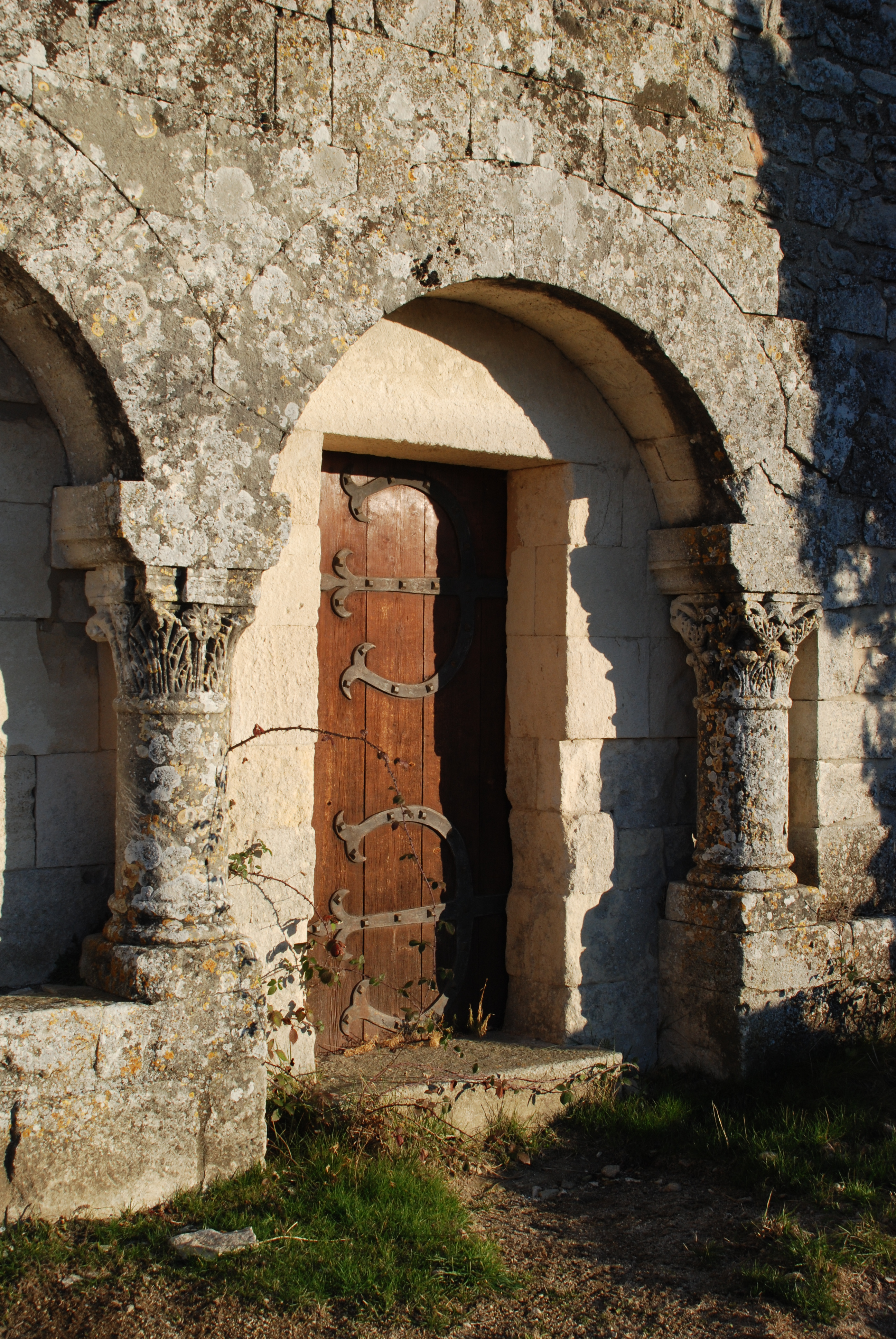 France - Provence - Chapelle Saint-Paul de Saint-Michel-l'Observatoire